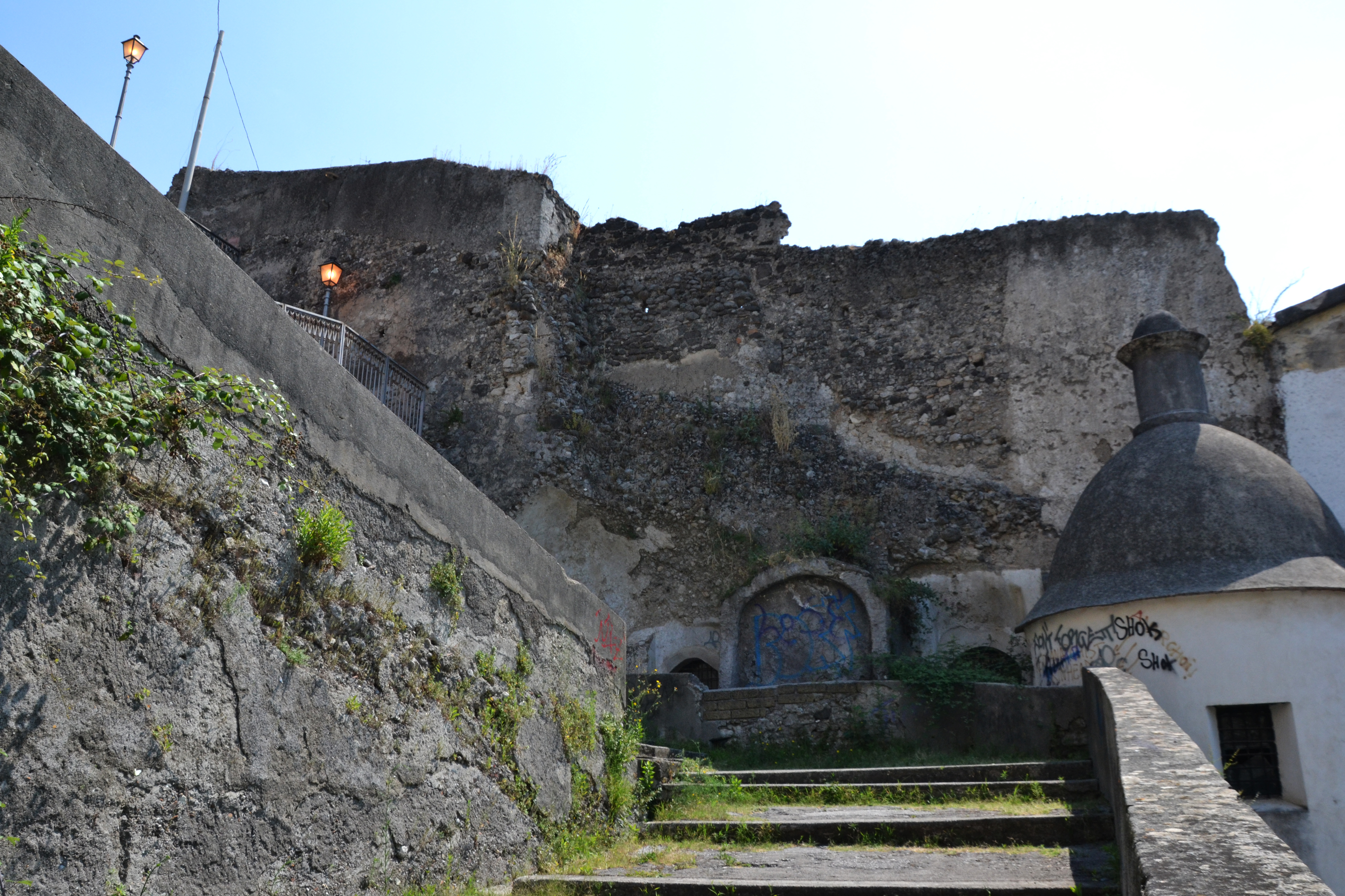 porzione delle mura di salerno lungo la facciata del convento di montevergine